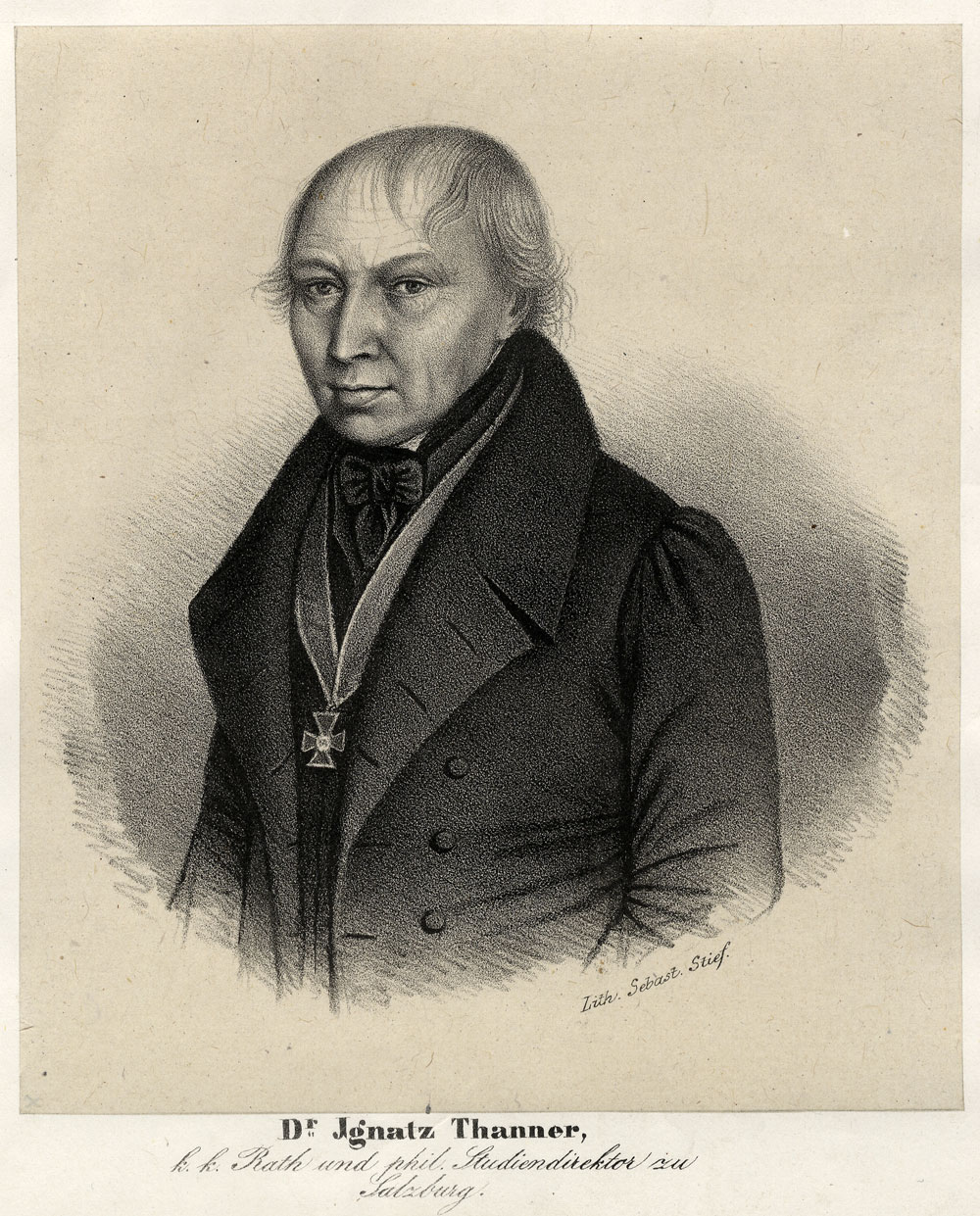 Porträt Dr. Ignatz Thanner, k.k. Rath und phil. Studiendirektor zu Salzburg; Lithographie; um 1850